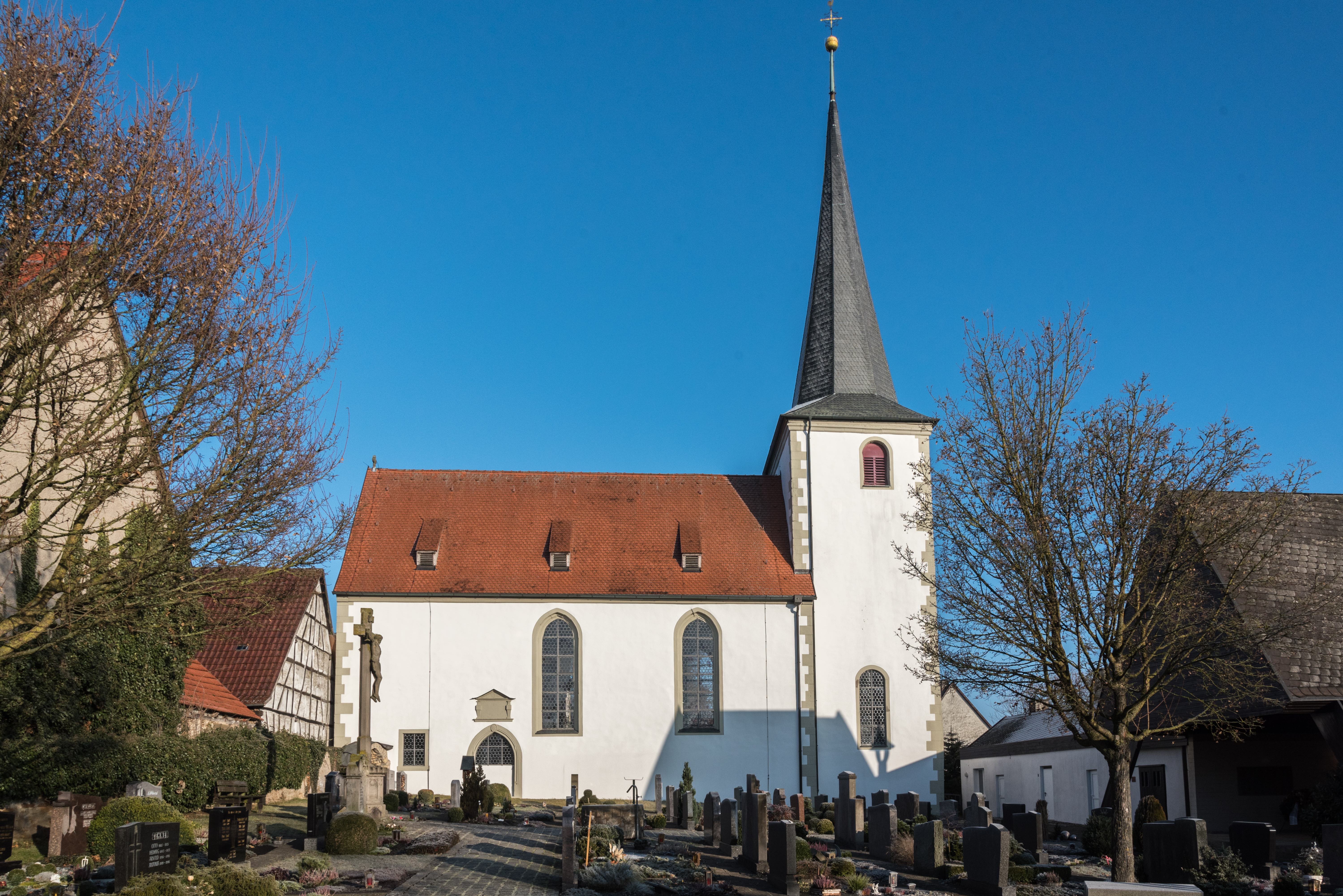 Üchtelhausen, Ebertshausen, Kath. Pfarrkirche St. Margaretha